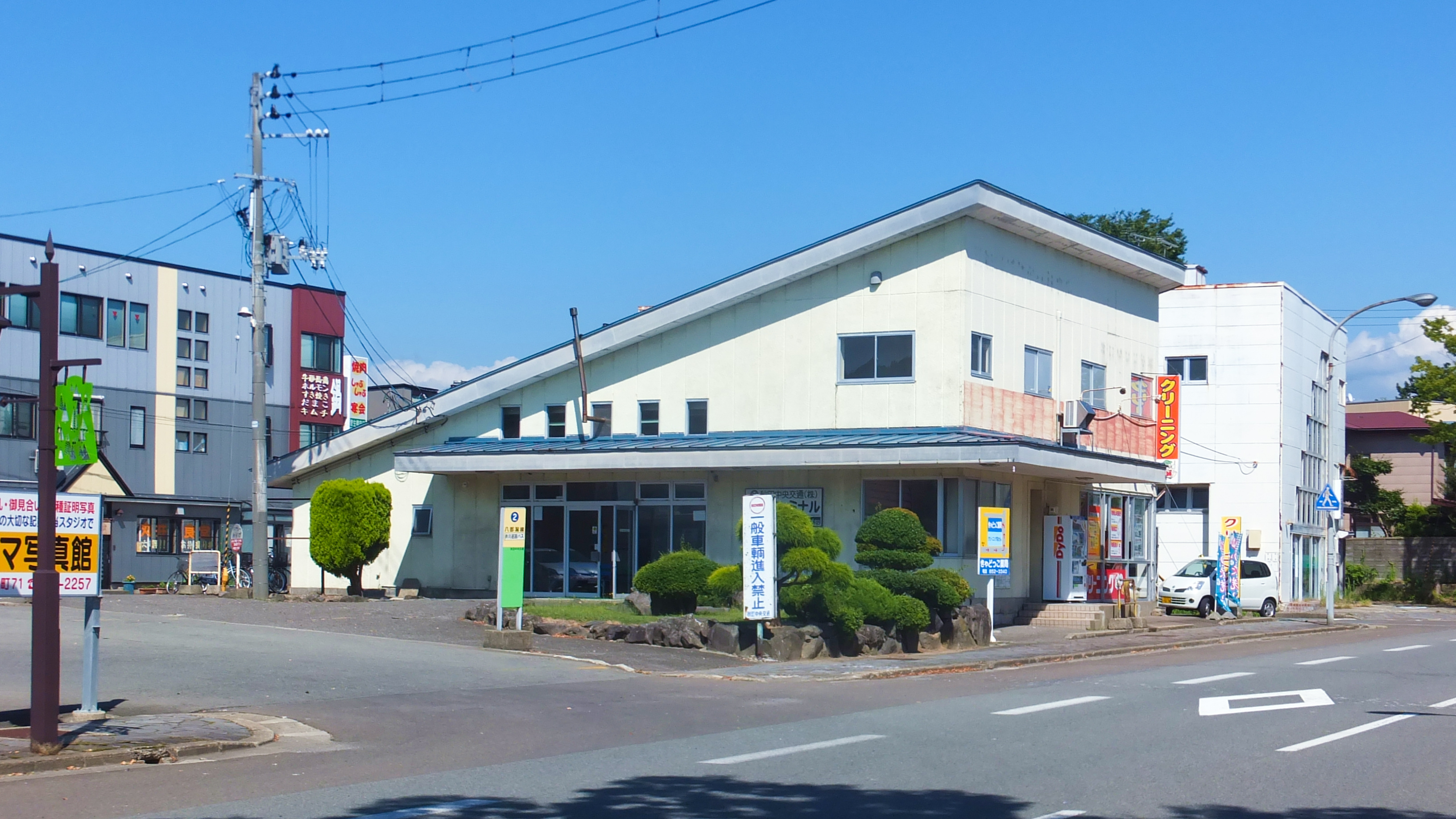 秋田中央交通五城目バスターミナル。かつての秋田中央交通軌道線、五城目駅（ごじょうのめえき）跡がそのまま利用されている。